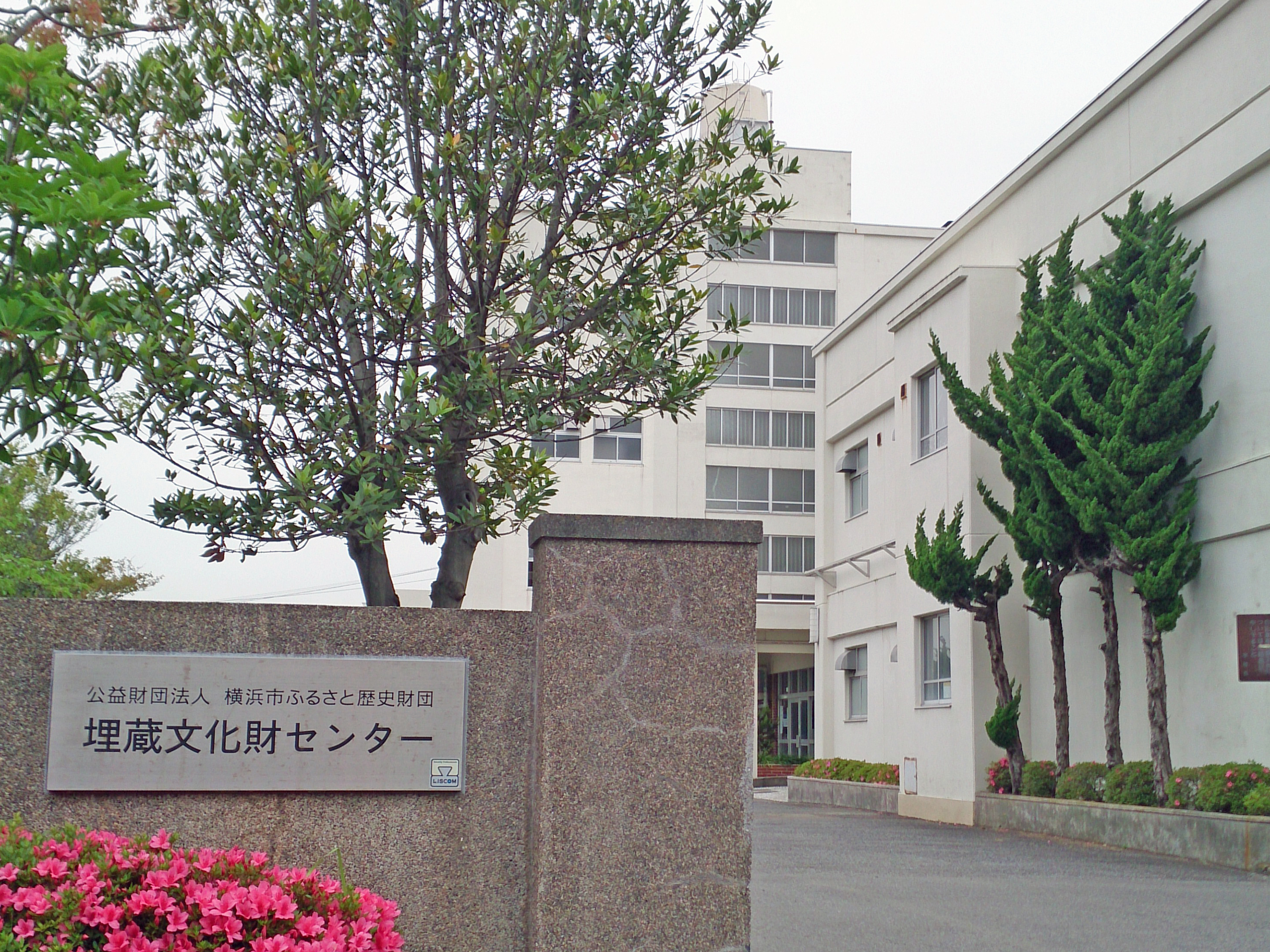 公益財団法人横浜市ふるさと歴史財団埋蔵文化財センター